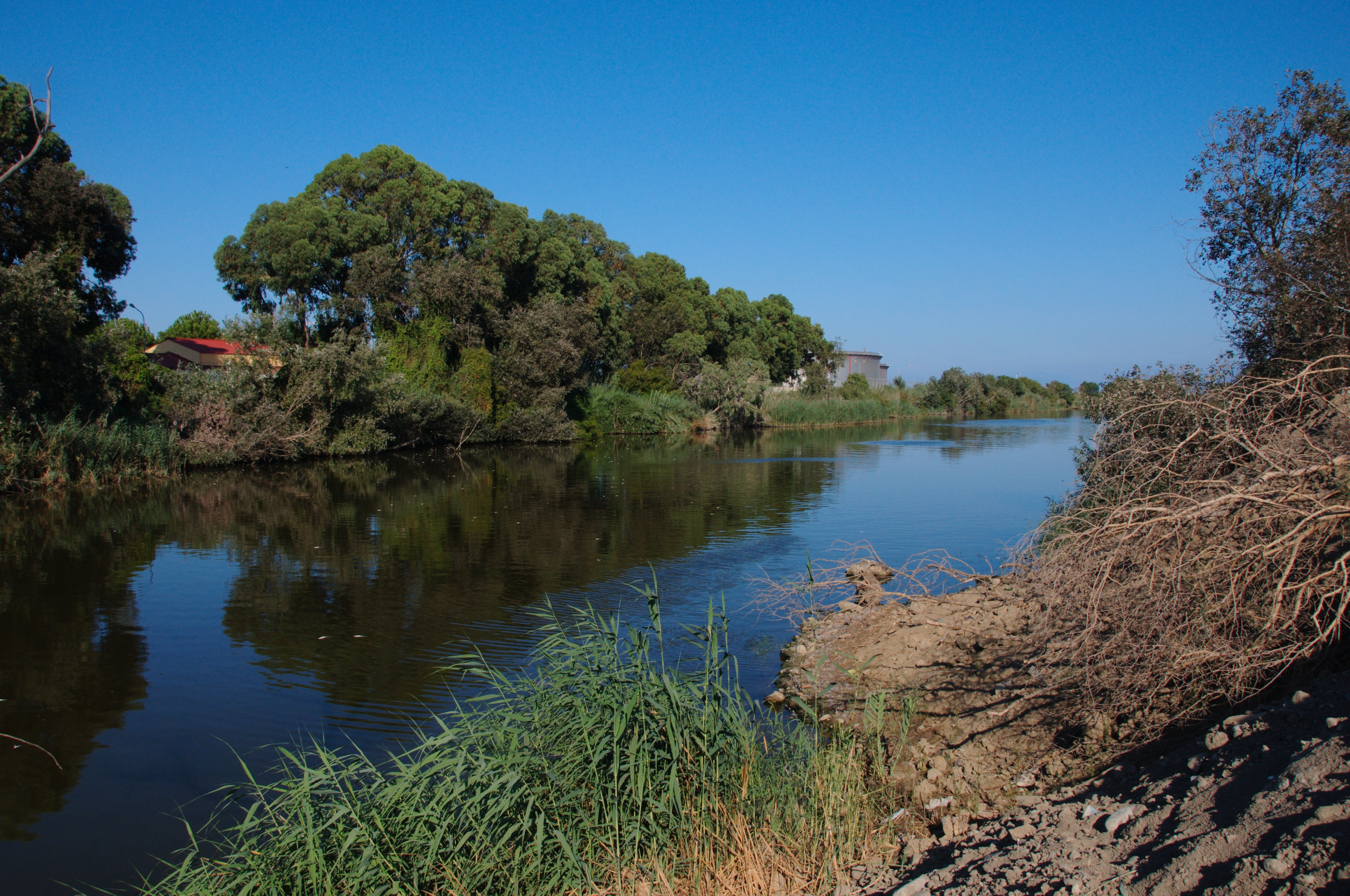 Poissons morts sur l'oued Soummam probablement une pollution aux pesticides suite à des pluies importantes